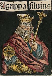 Зображення Агріппи Сільвія у Нюрнберзькій хроніці.